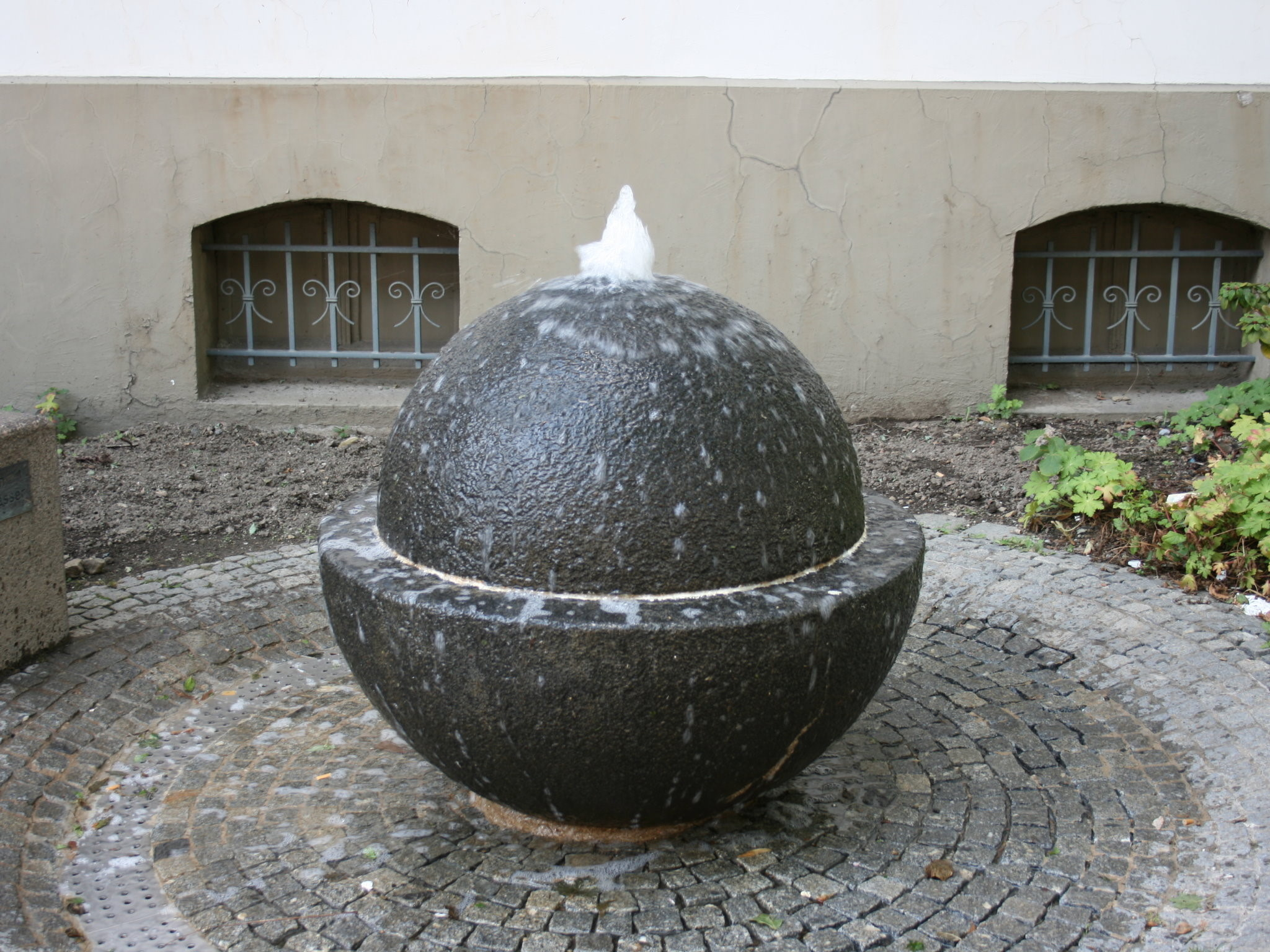 Amtshaus in Wuppertal-Langerfeld